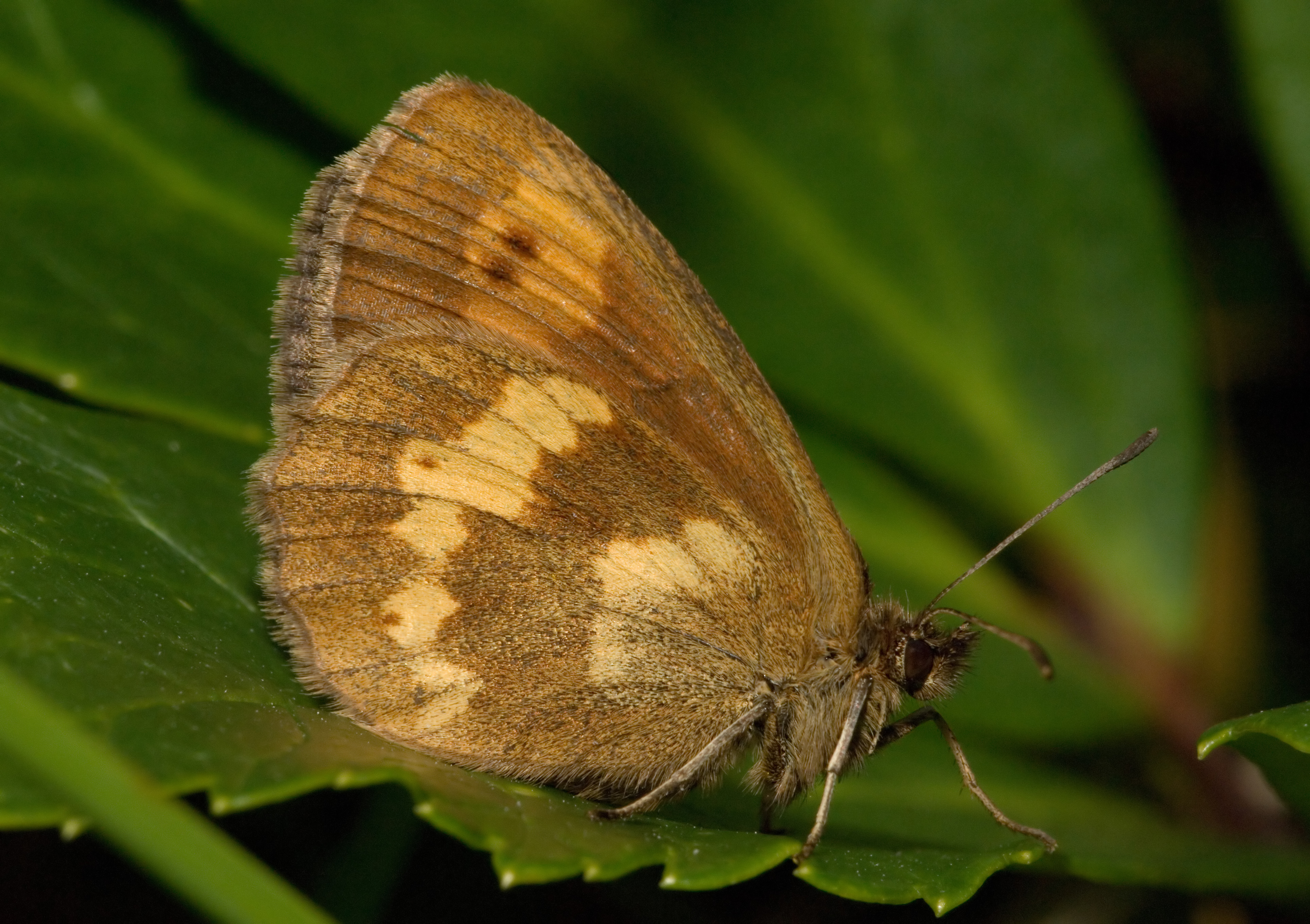 Erebia manto, female